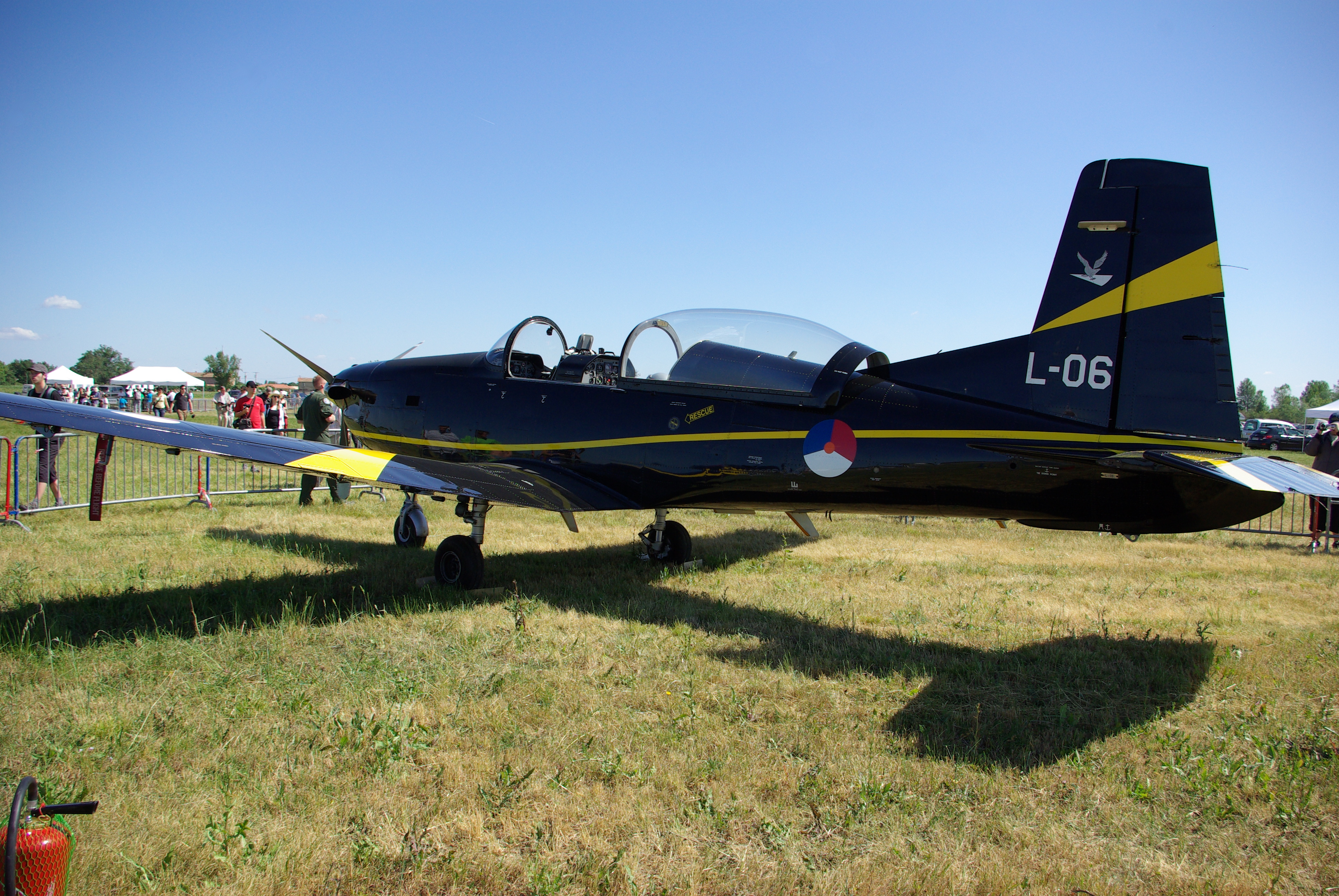 Pilatus PC-7 en présentation statique au meeting AirExpo 2011.